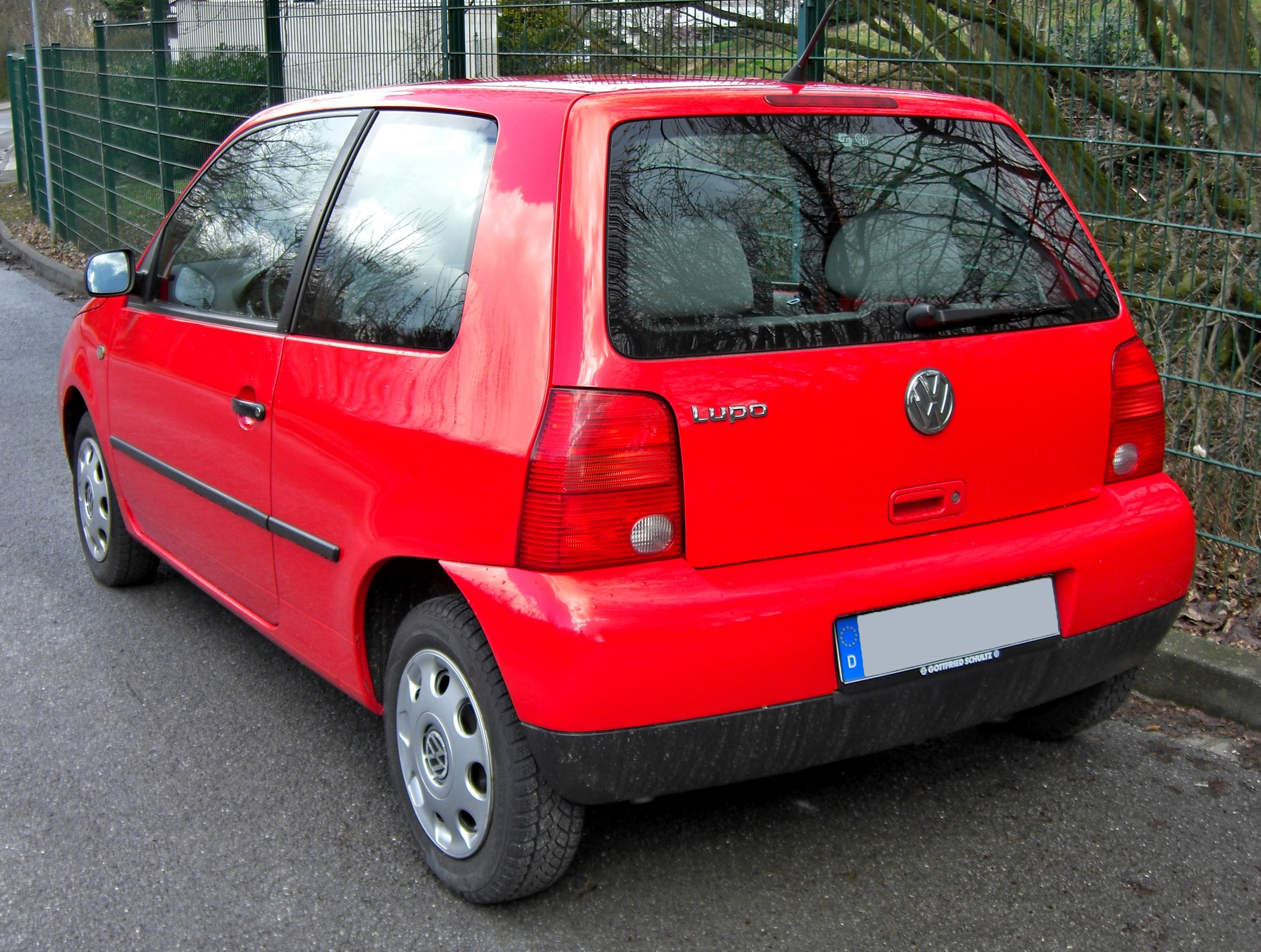 VW Lupo